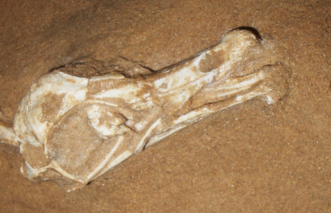 Fossil of Halszkaraptor (formerly labelled as a troodontid), an extinct dinosaur- Took the photo at Fossil Show, Munich 2011